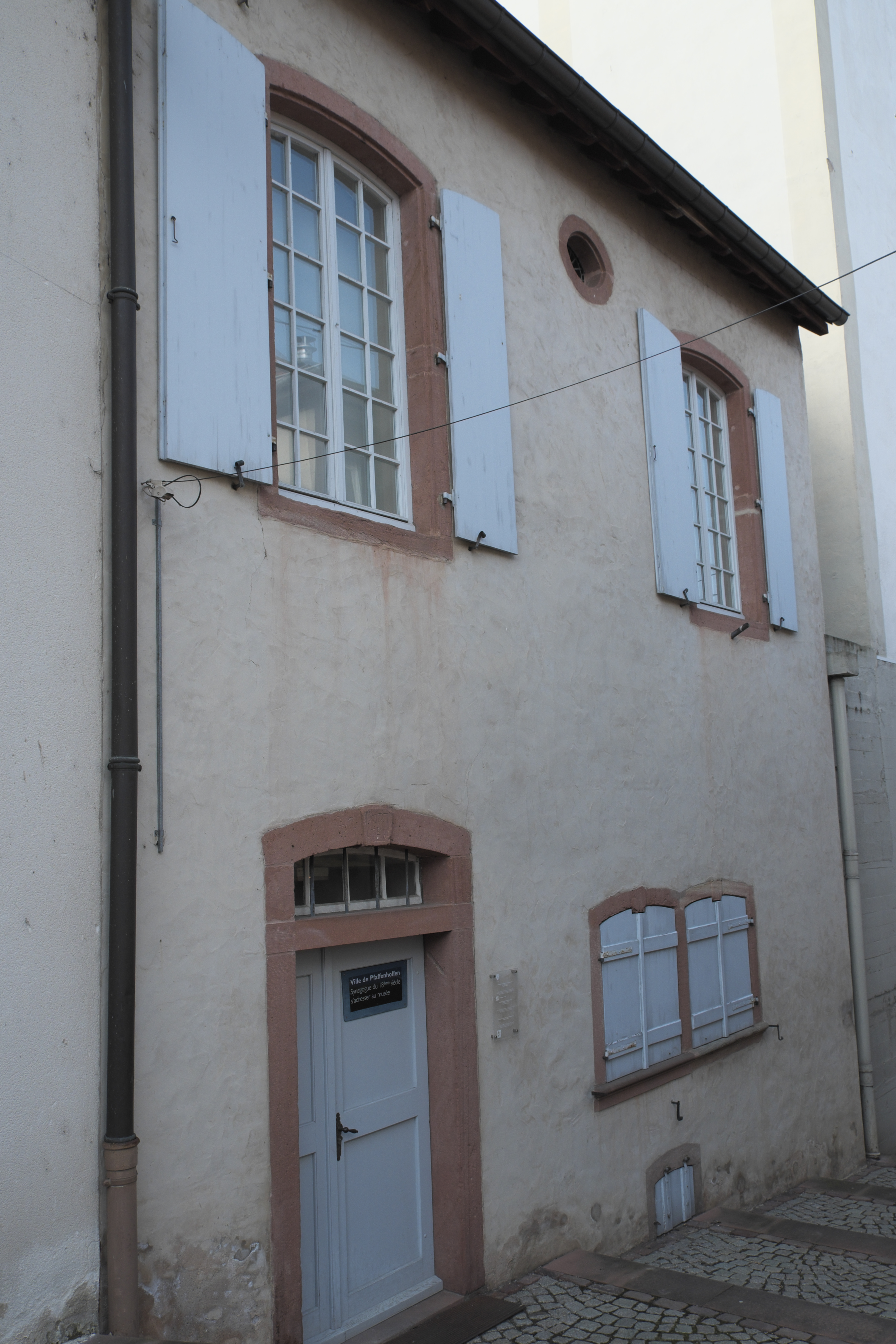 Synagoge in Pfaffenhoffen im Département Bas-Rhin (Region Alsace-Champagne-Ardenne-Lorraine/Frankreich), Eingang